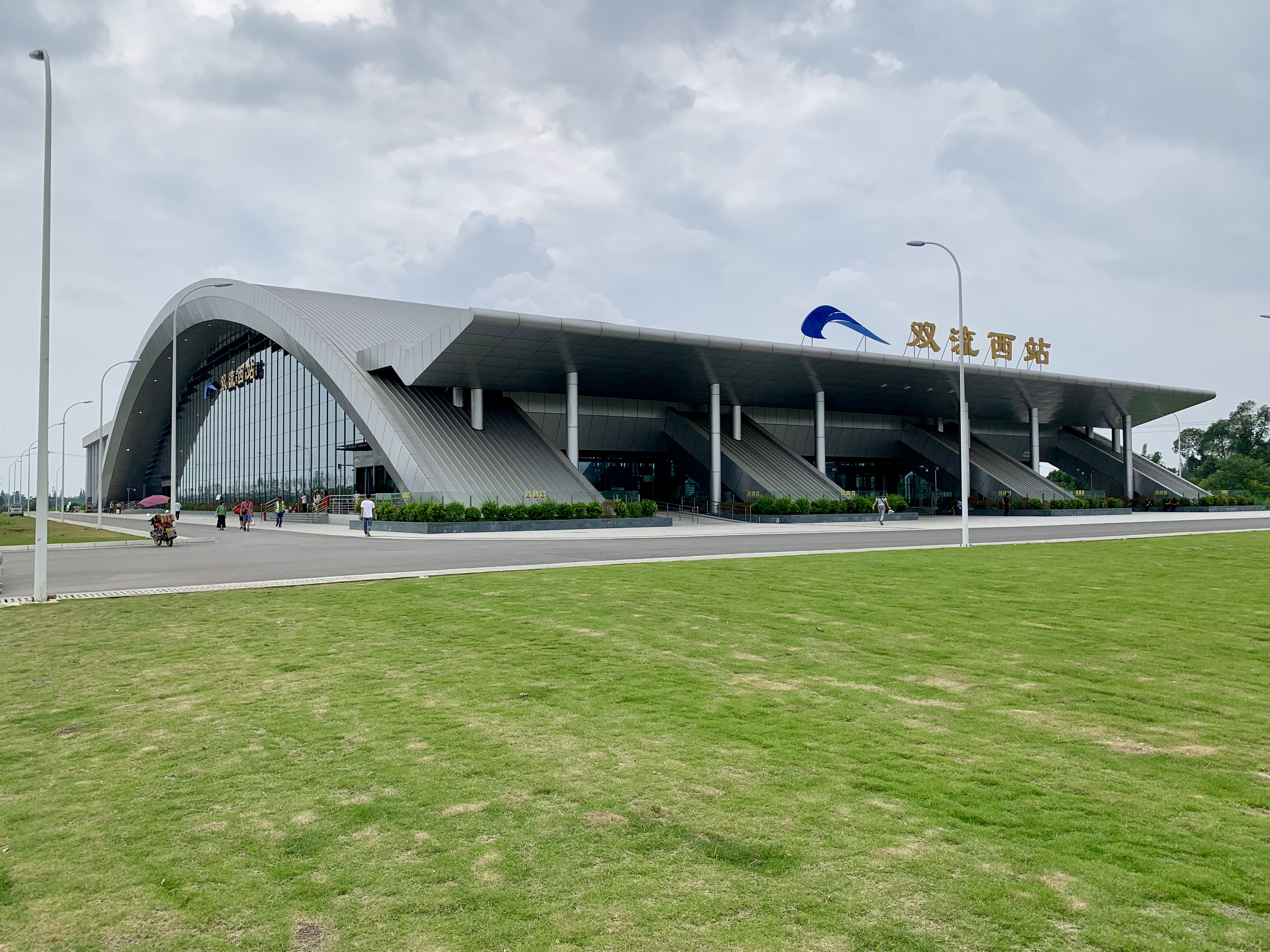 成都地铁双流西站站